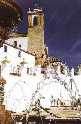 Imagen de la Torre de la Parroquia de Santa María del Alcor en El Viso del Alcor. Imagen tomada desde la Plaza Sacristán Guerrero.